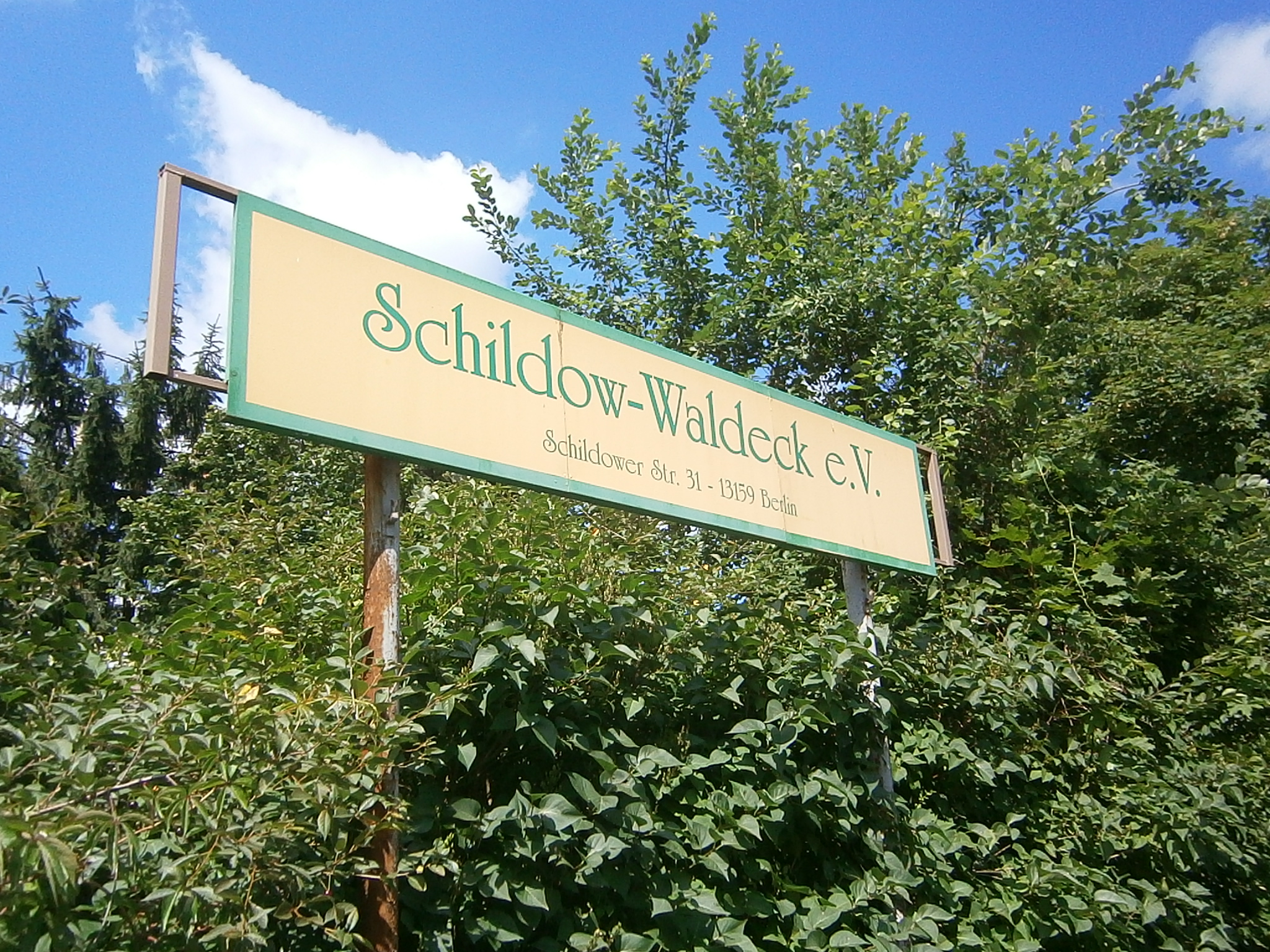 Die Siedlung Schildow-Waldeck ist eine Siedlung im Norden des Berliner Ortsteils Blankenfelde.